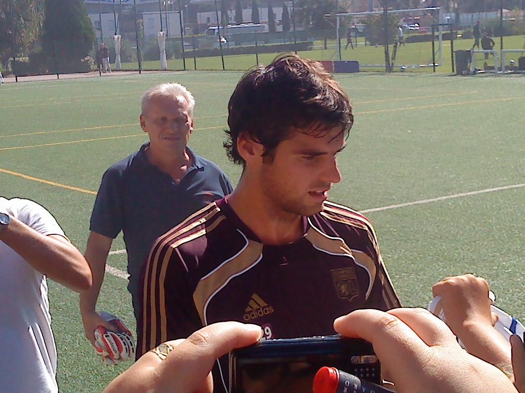 Yoann Gourcuff à la fin de son premier entrainement avec l'Olympique lyonnais